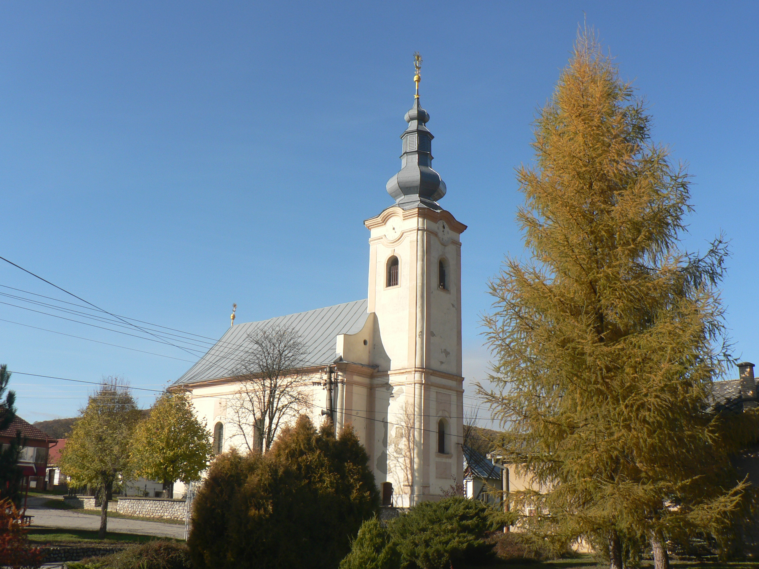 Kuntapolcai evangélikus templomon (Szlovákia)